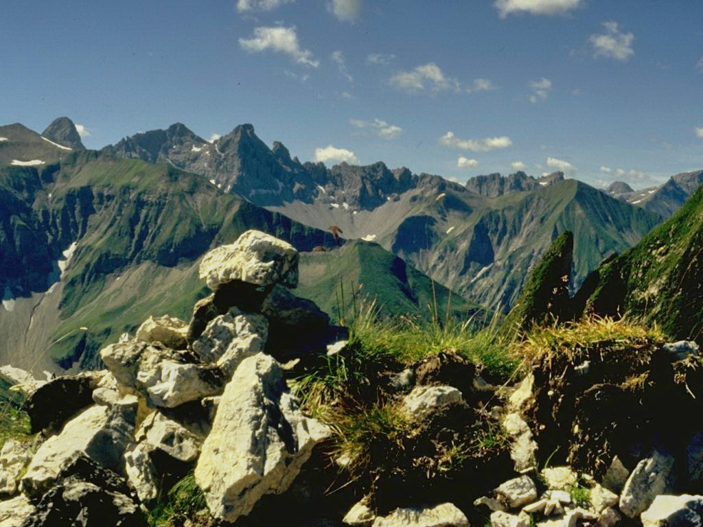 Krottenspitze von Kleiner Höfats